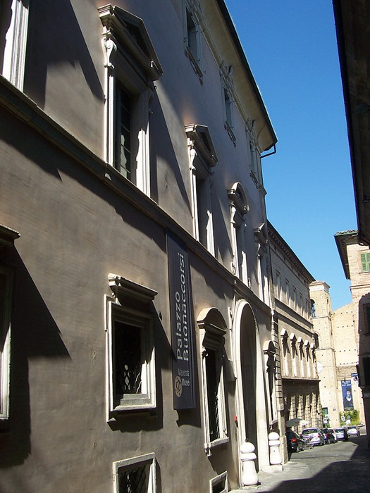 Macerata - Palazzo Buonaccorsi (Museo della Carrozza)